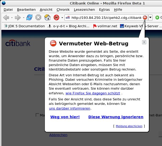 Phishingwarnung unter Firefox 2.0